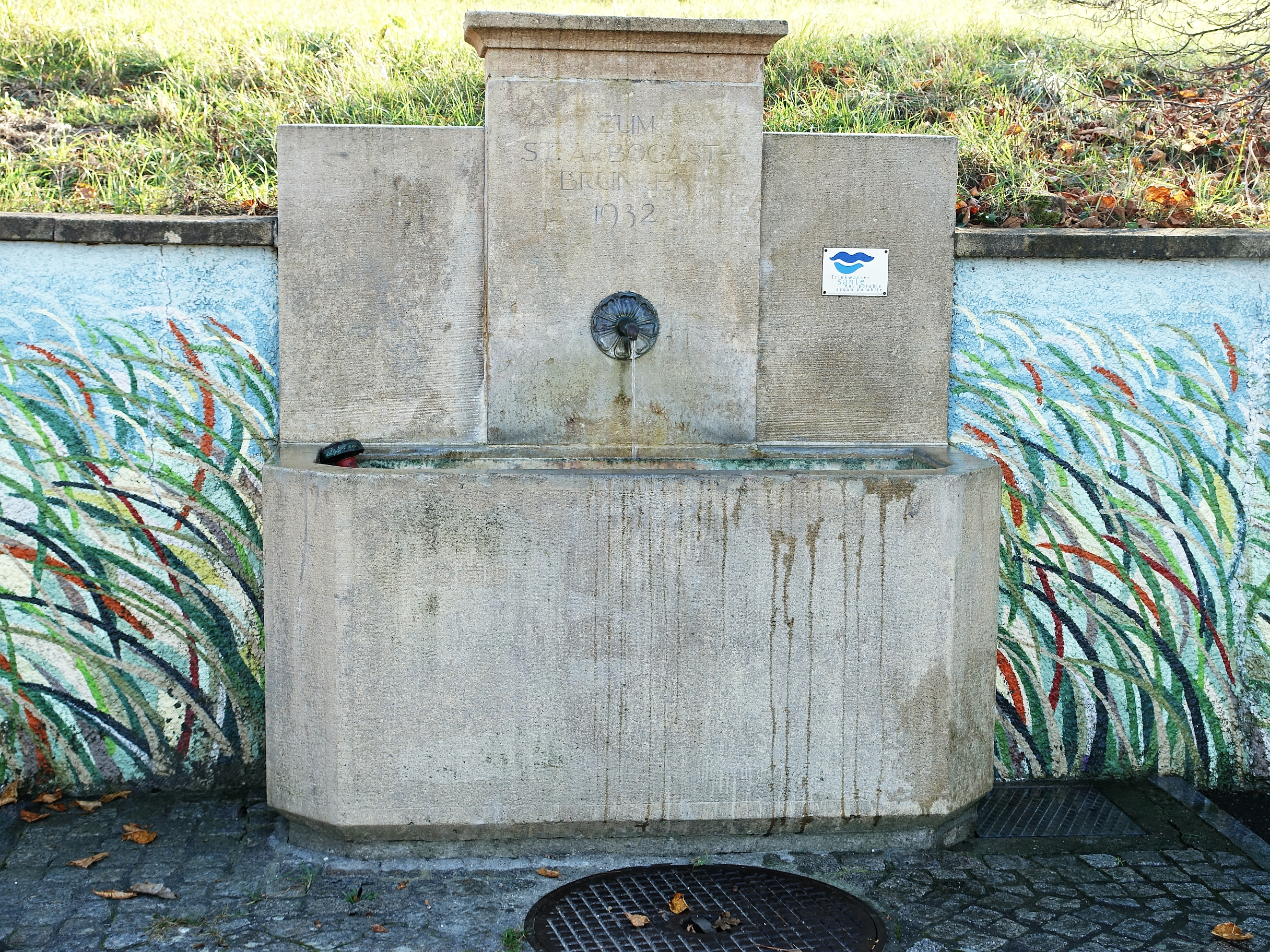 Arbogast Brunnen in Muttenz, Basel-Land, Schweiz